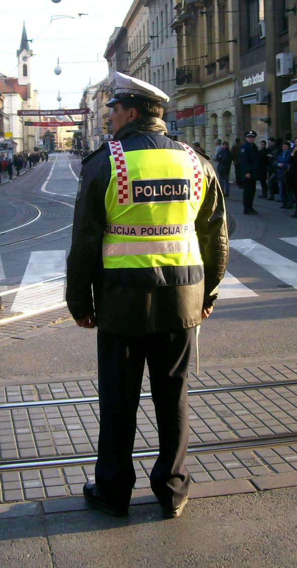 Hrvatski prometni policajac